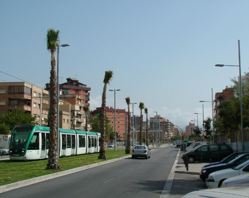 Trambesòs en Av Marqués de Mont-Roig.